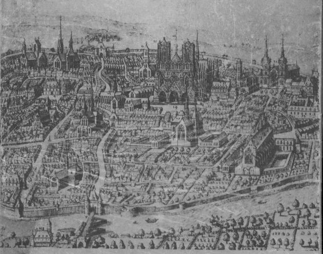 Carte_de_Reims_XVIIe_Siècle, plan Moreau de 1622 BM Reims.